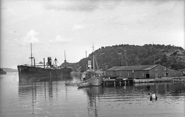 Hvalbåten Seksern ligger til kai. Ronald ligger oppankret på fjorden.(Filmbeholder datostemplet Feb 1941, men en lapp i beholderen sier år 1939)